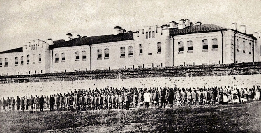 La prigione di Gornyj Zerentuj vista dall'interno delle mura